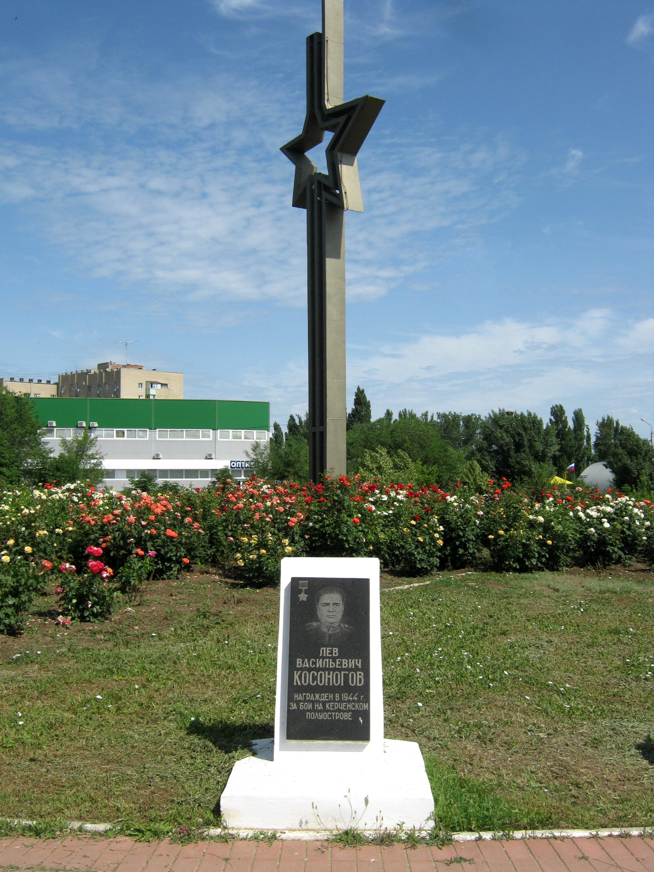 Каменск - Косоногов 1